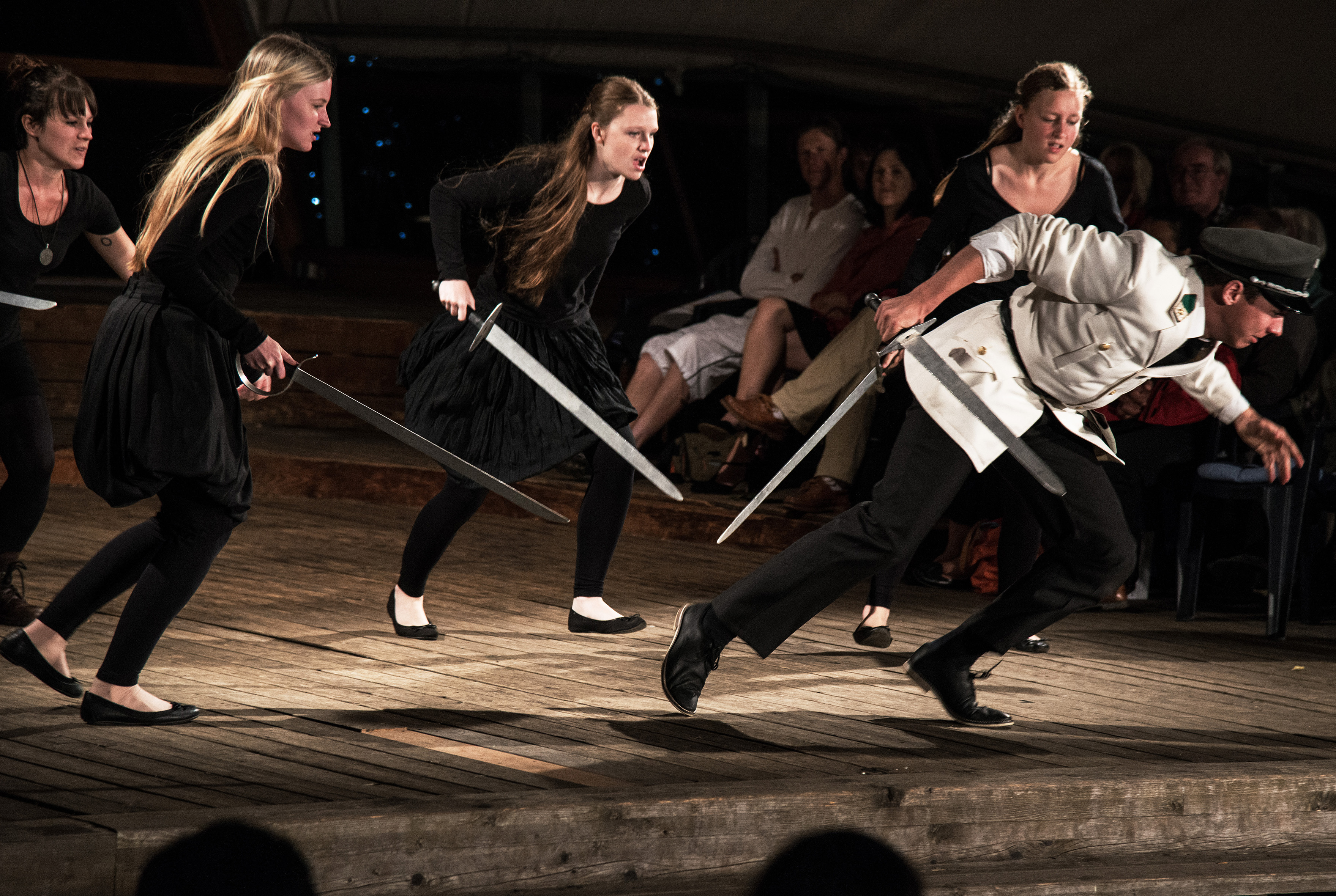 Julius Caesar by William Shakespeare performed at Shakespeare in Styria 2014, with Christoph Johan (as Octavius)